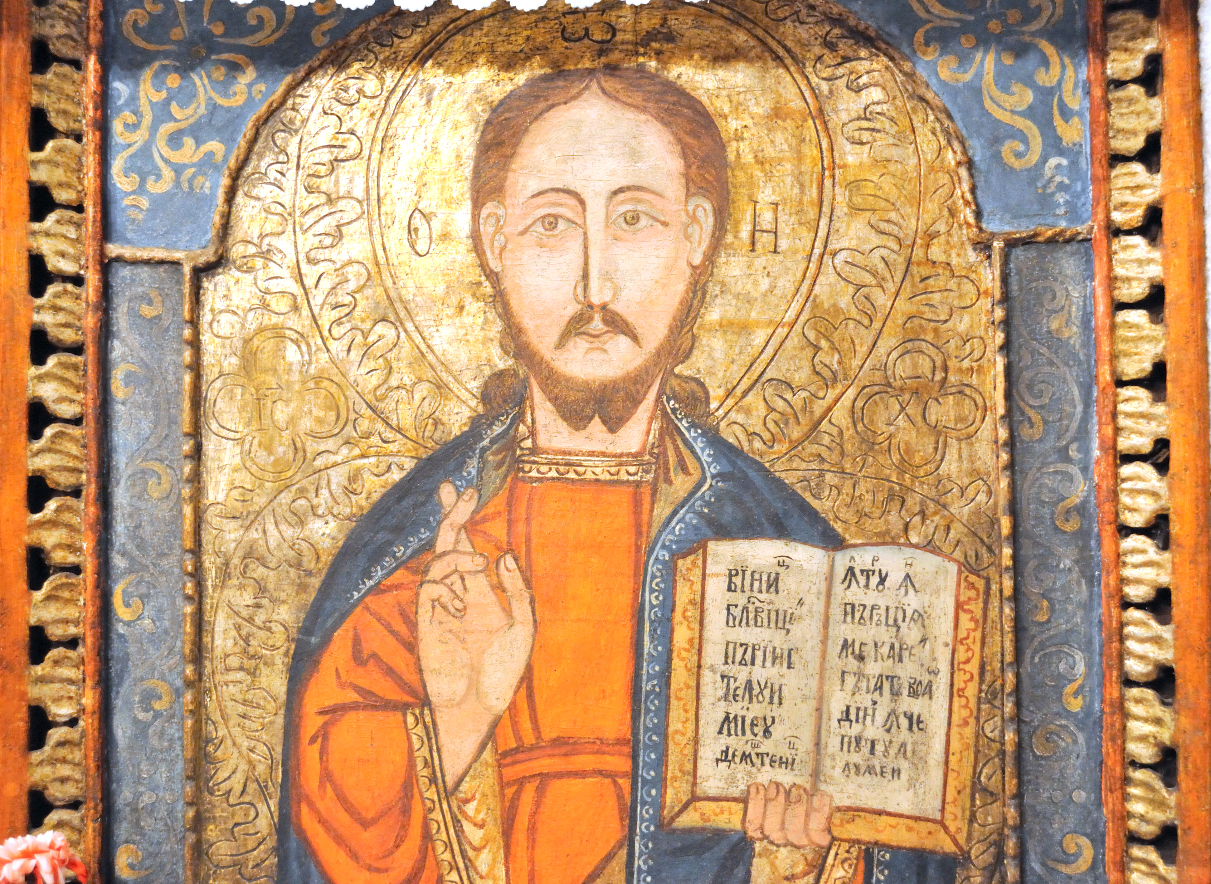 Biserica de lemn „Cuvioasa Paraschiva" din Desești, județul Maramureș